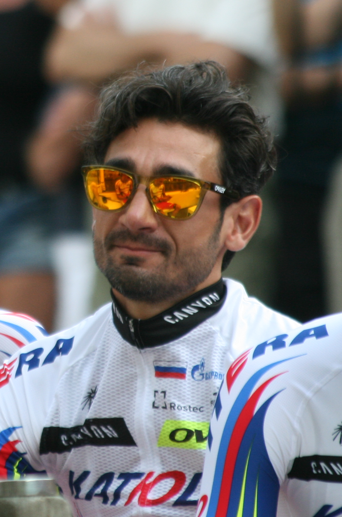 ploegenpresentatie Tour de France 2015 Utrecht